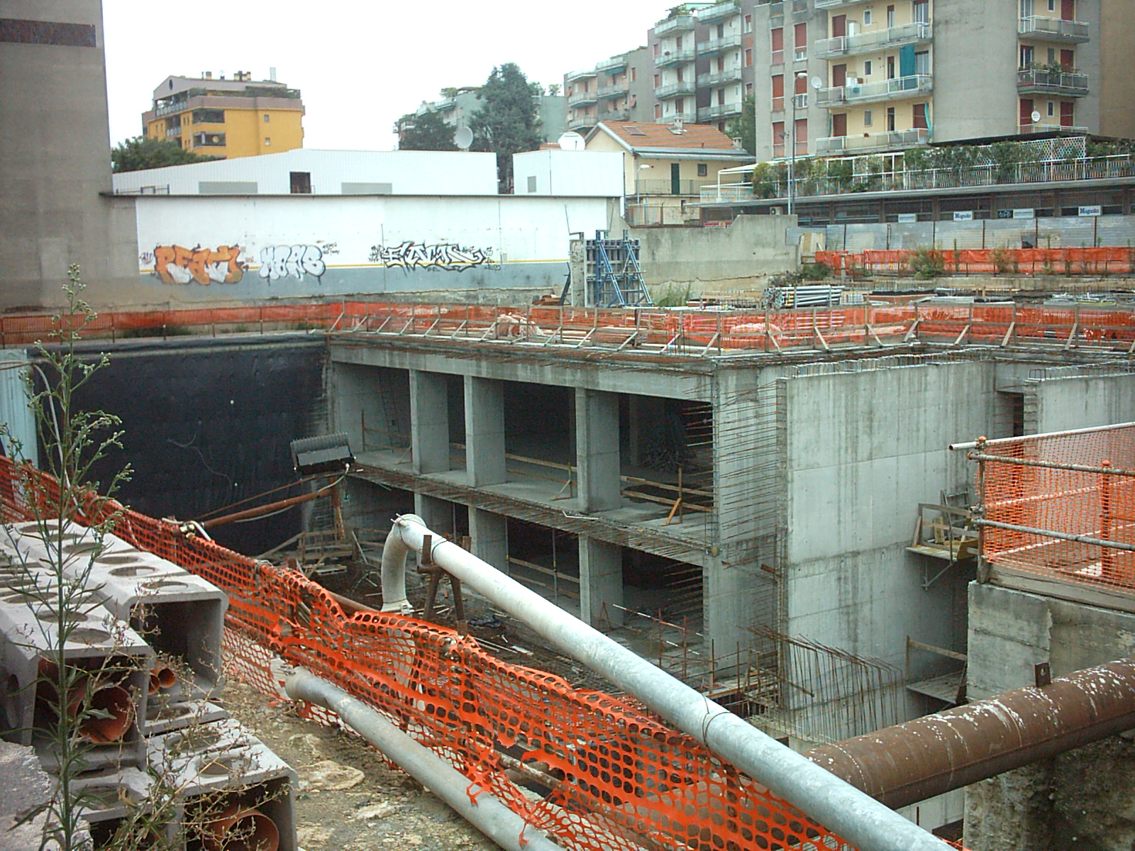 Milano, il cantiere della stazione della metropolitana di Affori Centro, sulla linea M3.